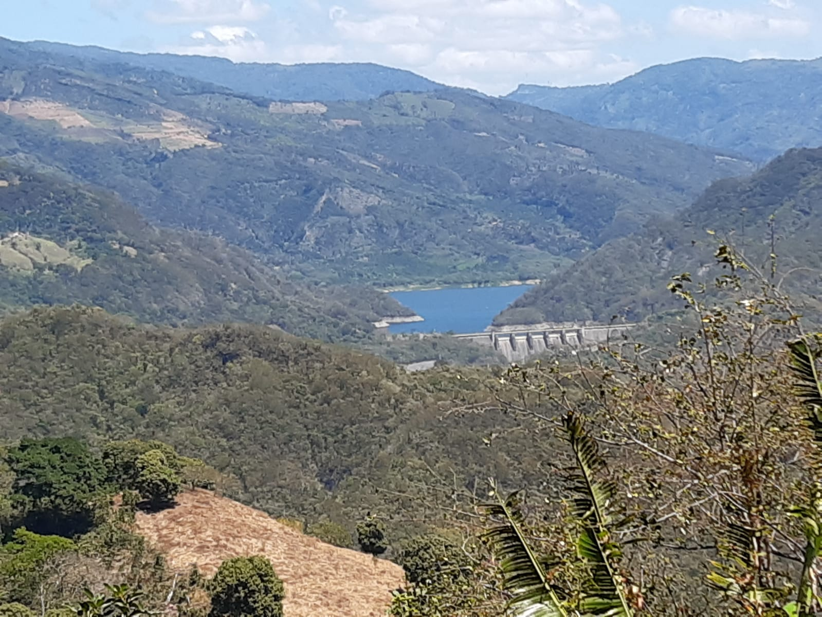 Valdesia Dam, DR.